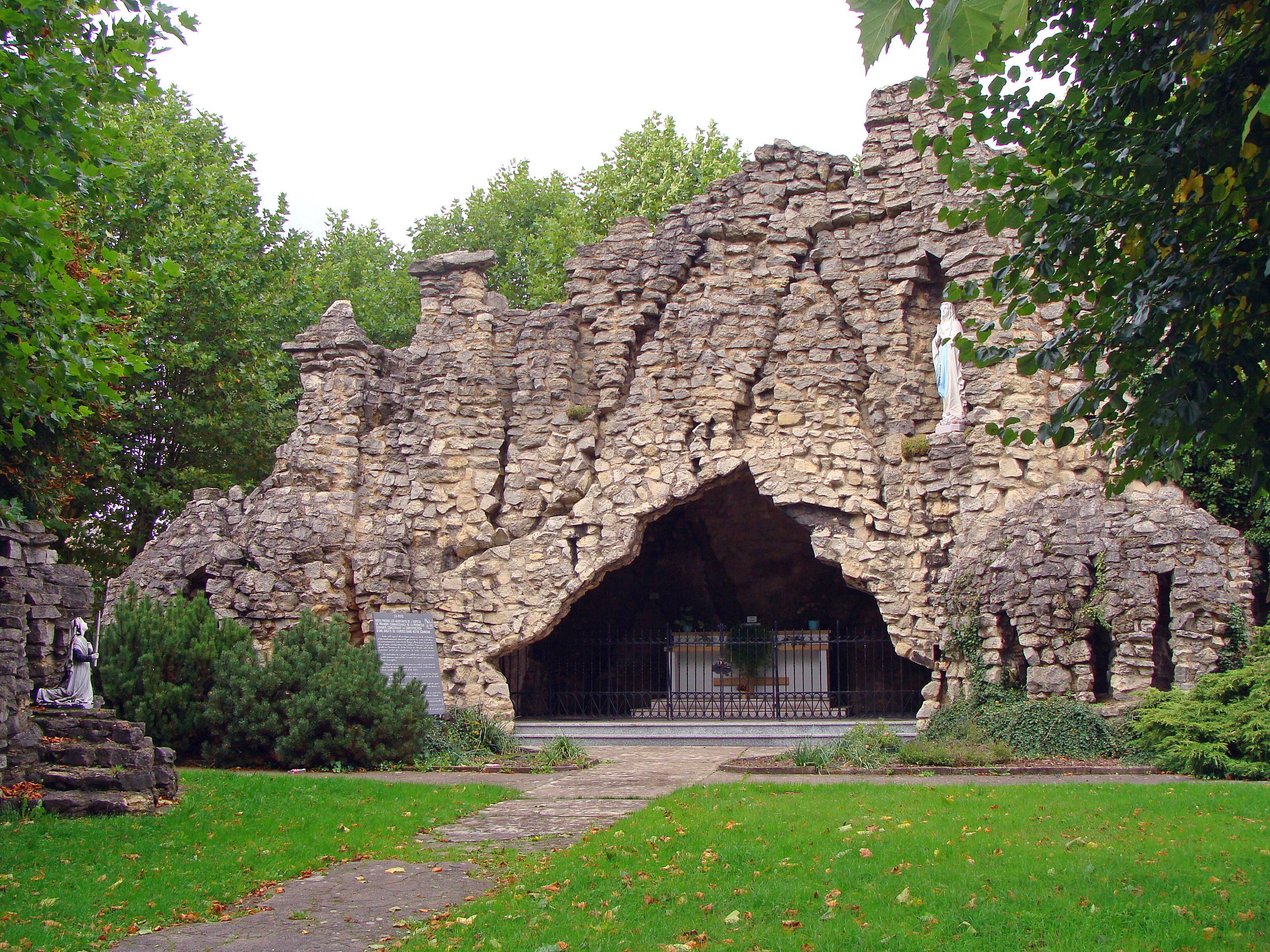 Grotte de Notre-Dame de Lourdes de L'Hôpital (Moselle)